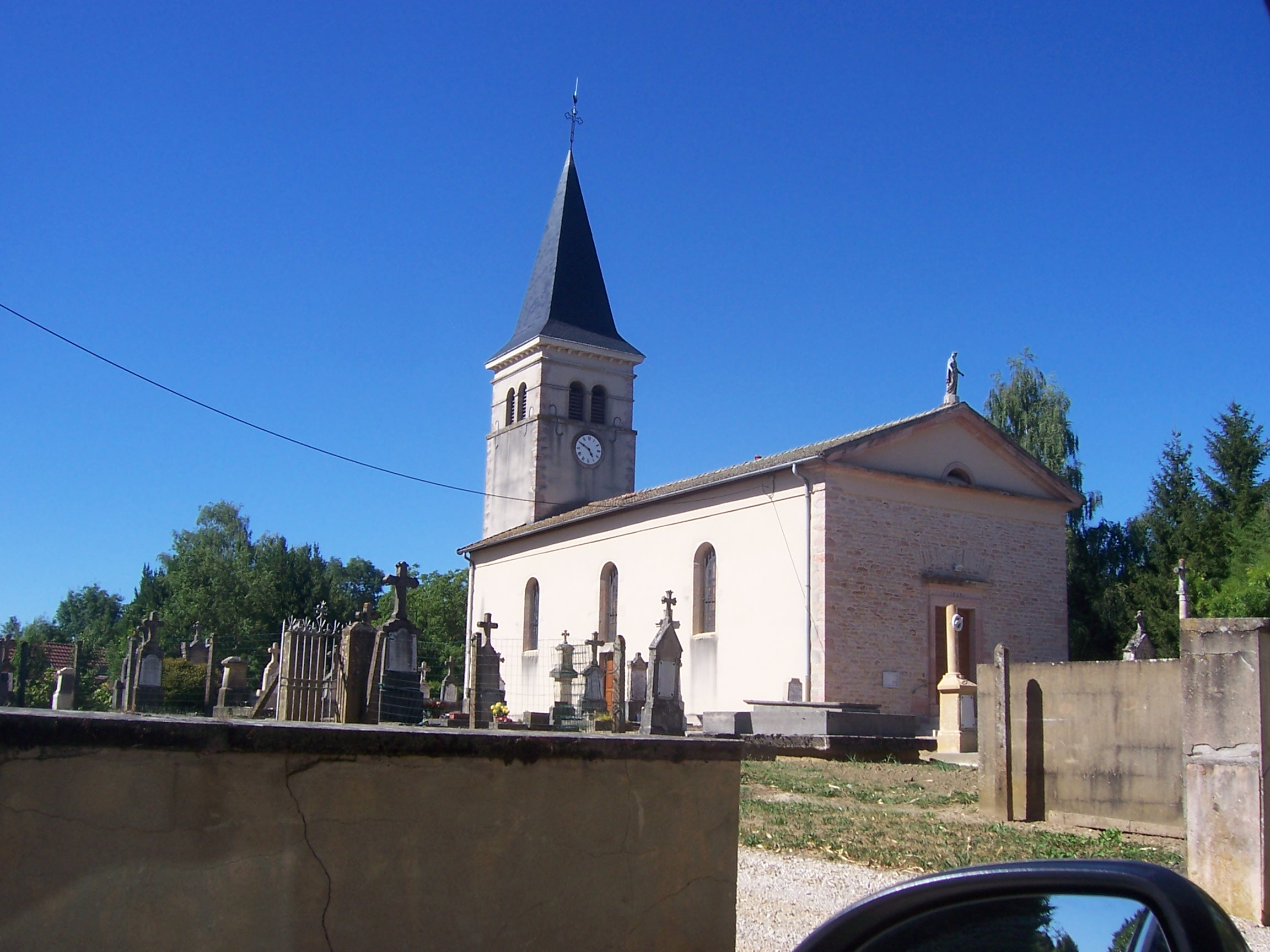 Eglise de Jouvençon